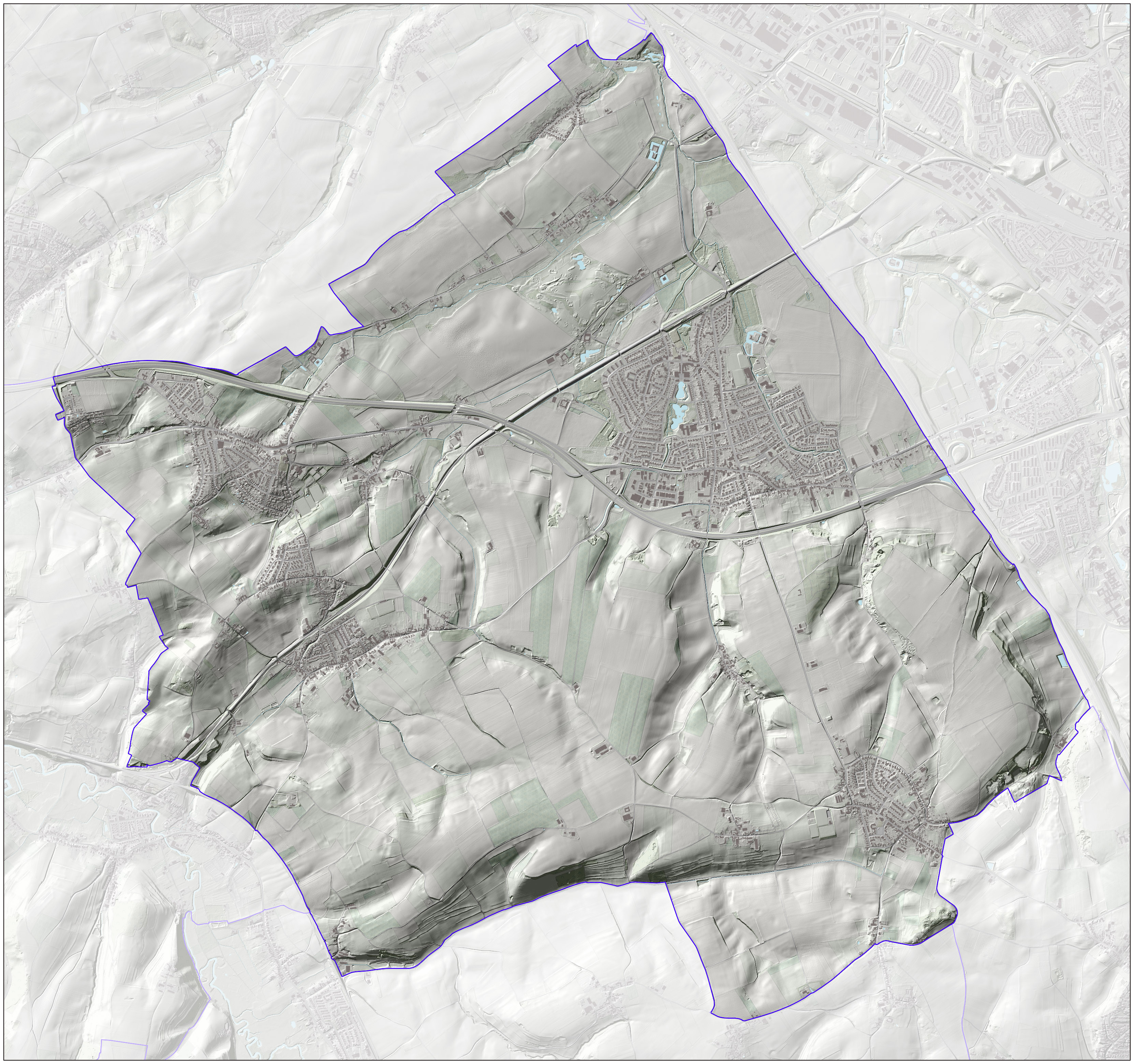 Reliëfbeeld van de gemeente, o.b.v. het Actuele Hoogtebestand Nederland (AHN2, open data) met subtiele elementen uit de Basisregistratie Topografie (BRT/Top10NL, open data). Kaartbeeld samengesteld door Jan-Willem van Aalst.